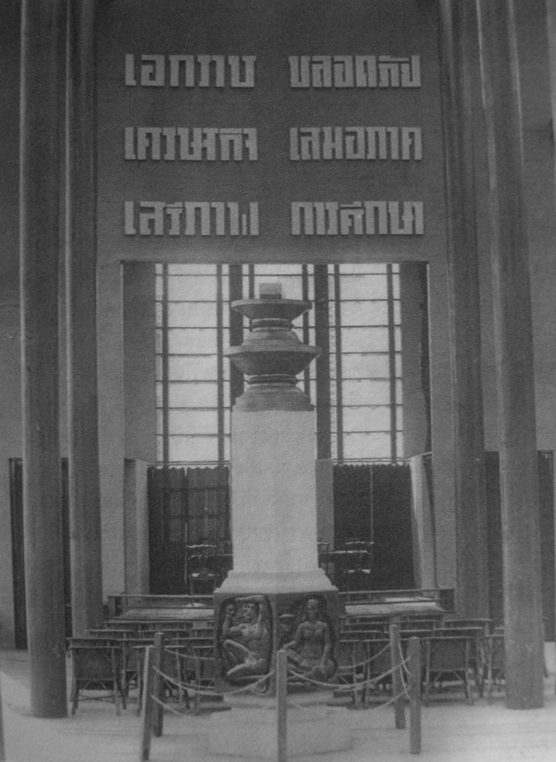 "หลัก 6 ประการของคณะราษฎร ในซุ้มงานฉลองรัฐธรรมนูญ"